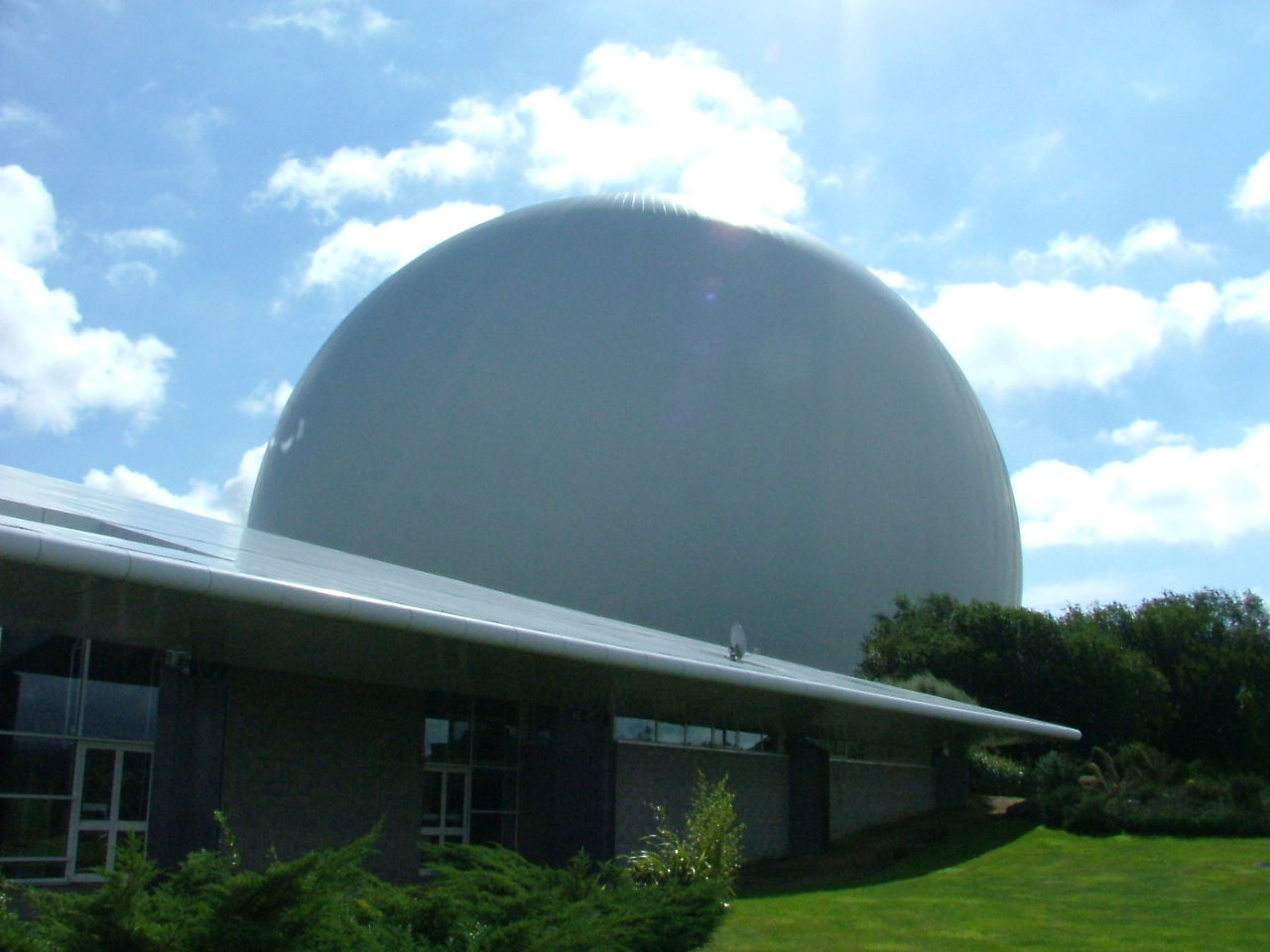 le radôme de pleumeur-bodou (Radôme de 1961 protégeant une antenne cornet de 340 tonnes. Il se trouve à Pleumeur-Bodou dans les Côtes d'Armor 22 (France)